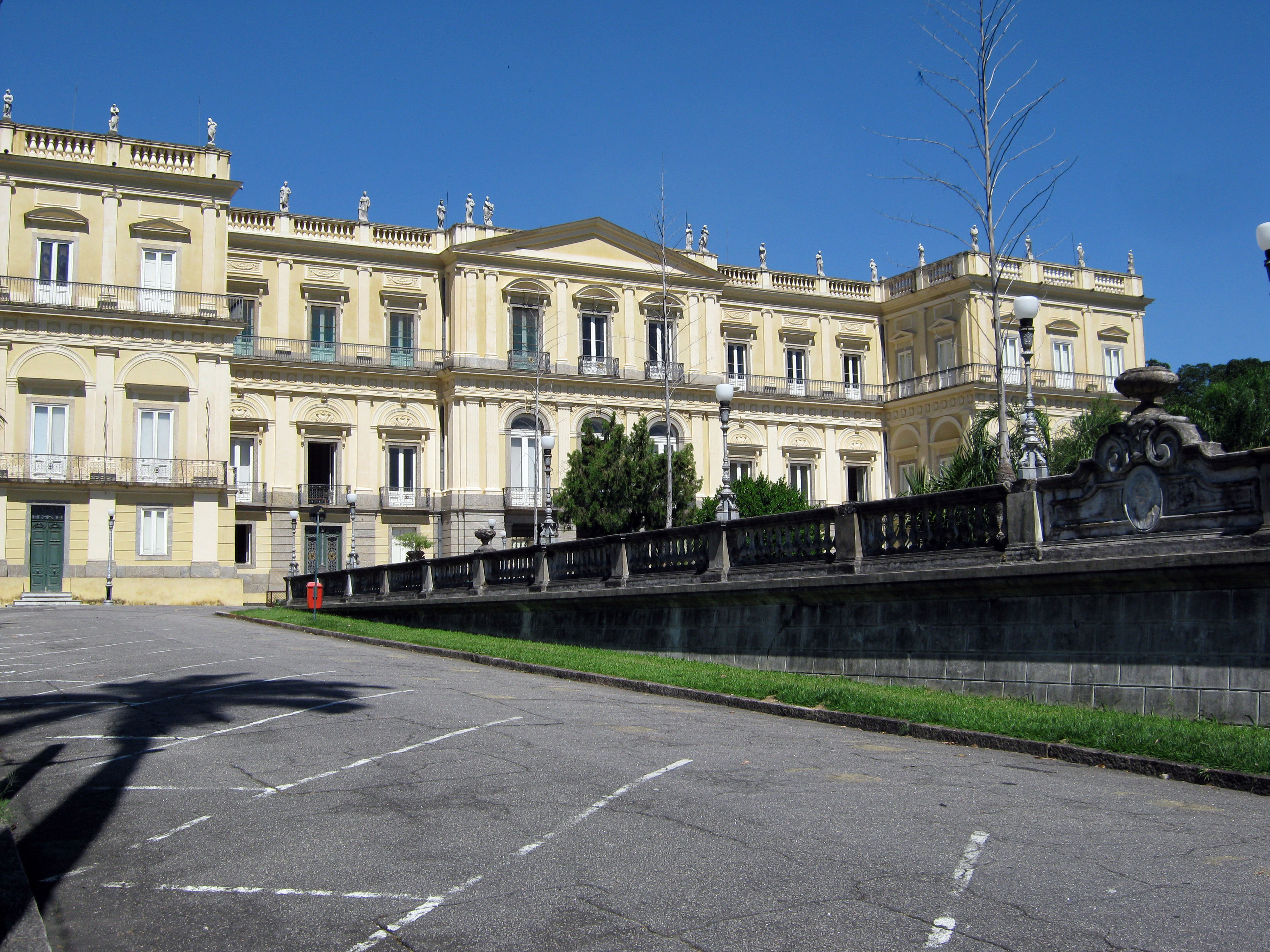 Quinta da Boa Vista - Museu Nacional